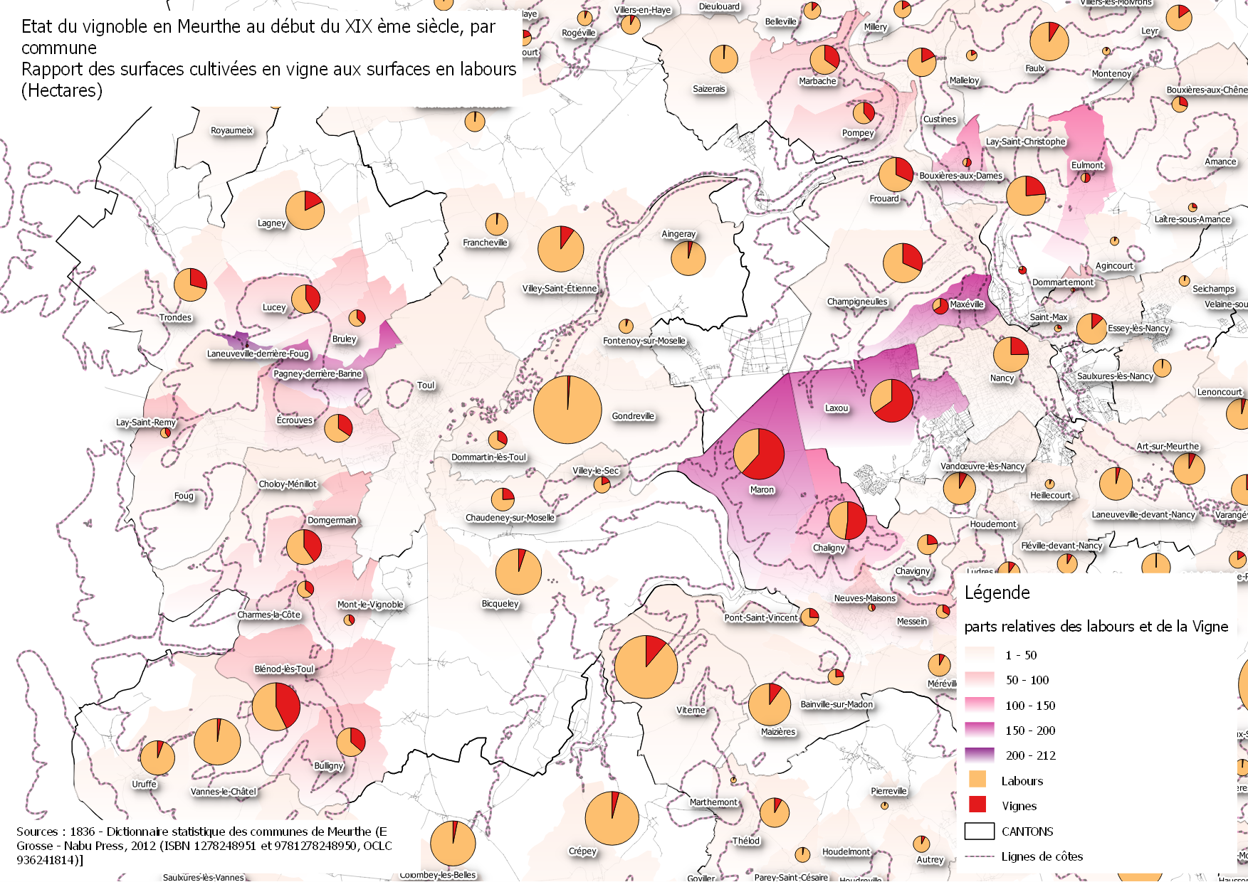 Etat du vignoble en Meurthe au début du XIX ème siècle, par commune Rapport des surfaces cultivées en vigne aux surfaces en labours (Hectares)